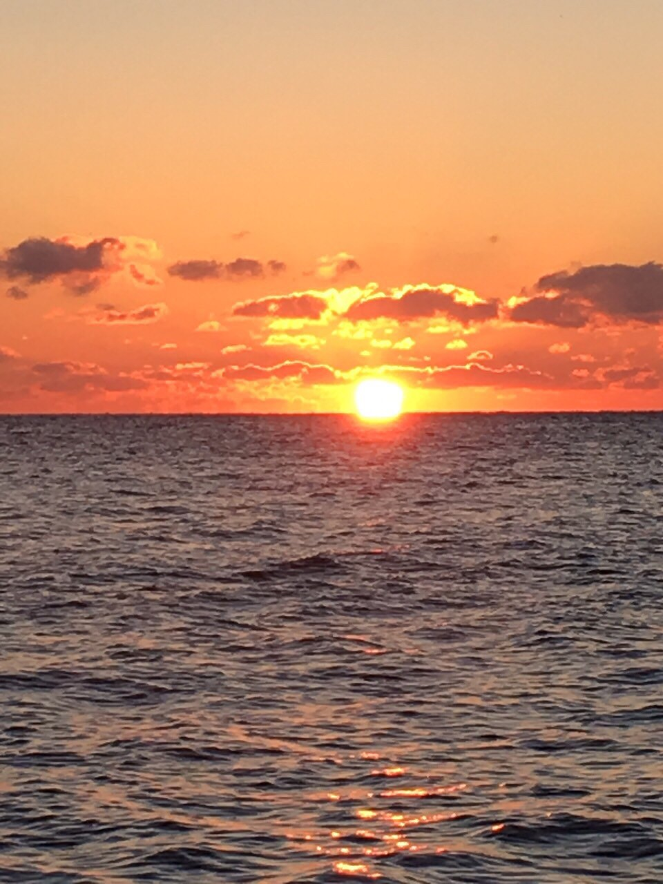 シードリーム 金華山からみる夕焼け